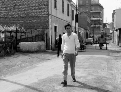 Accattone